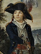 Portrait du général Cacault